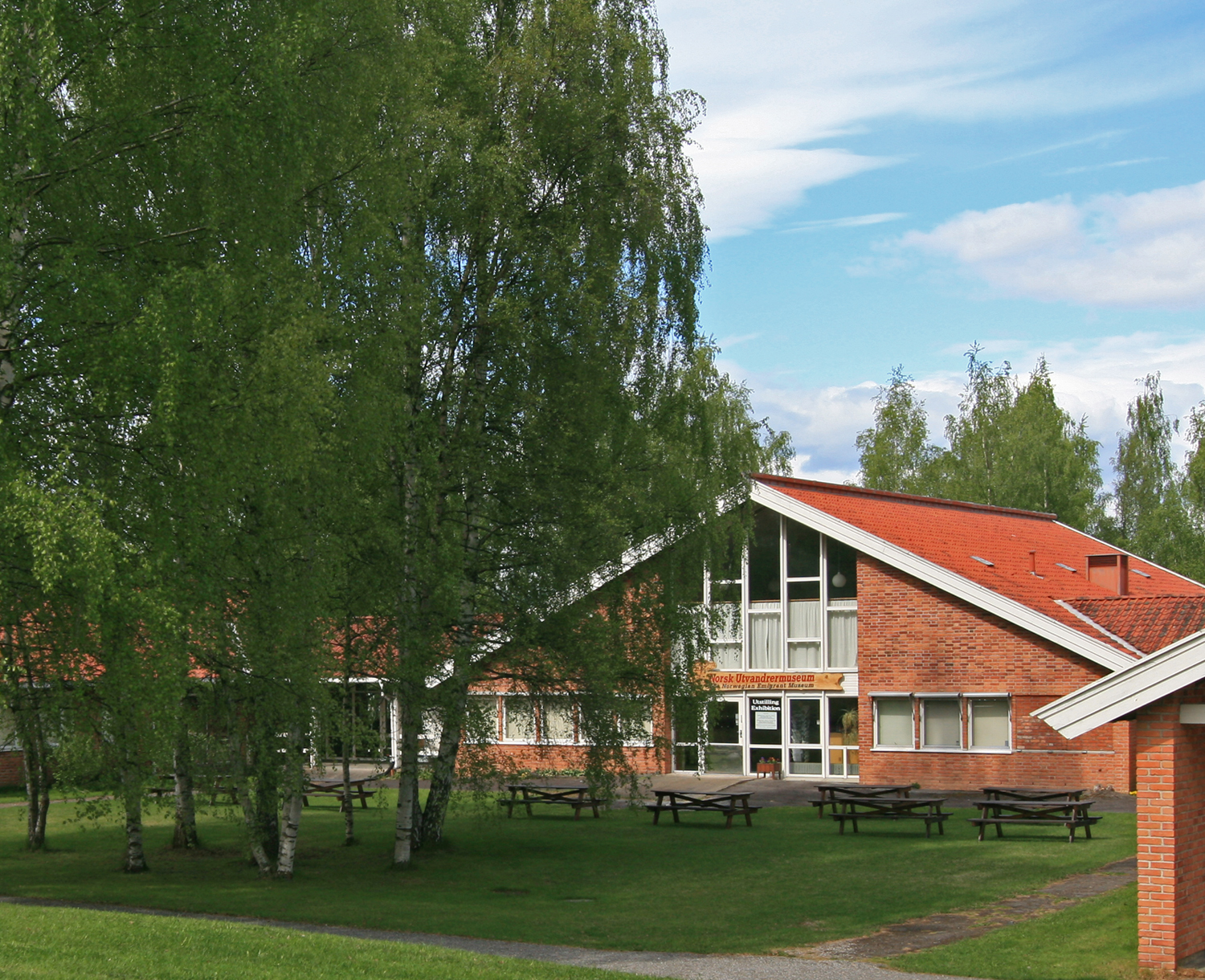 Norsk utvandrermuseum / Norwegian Emigrant Museum, Stange, Norway.